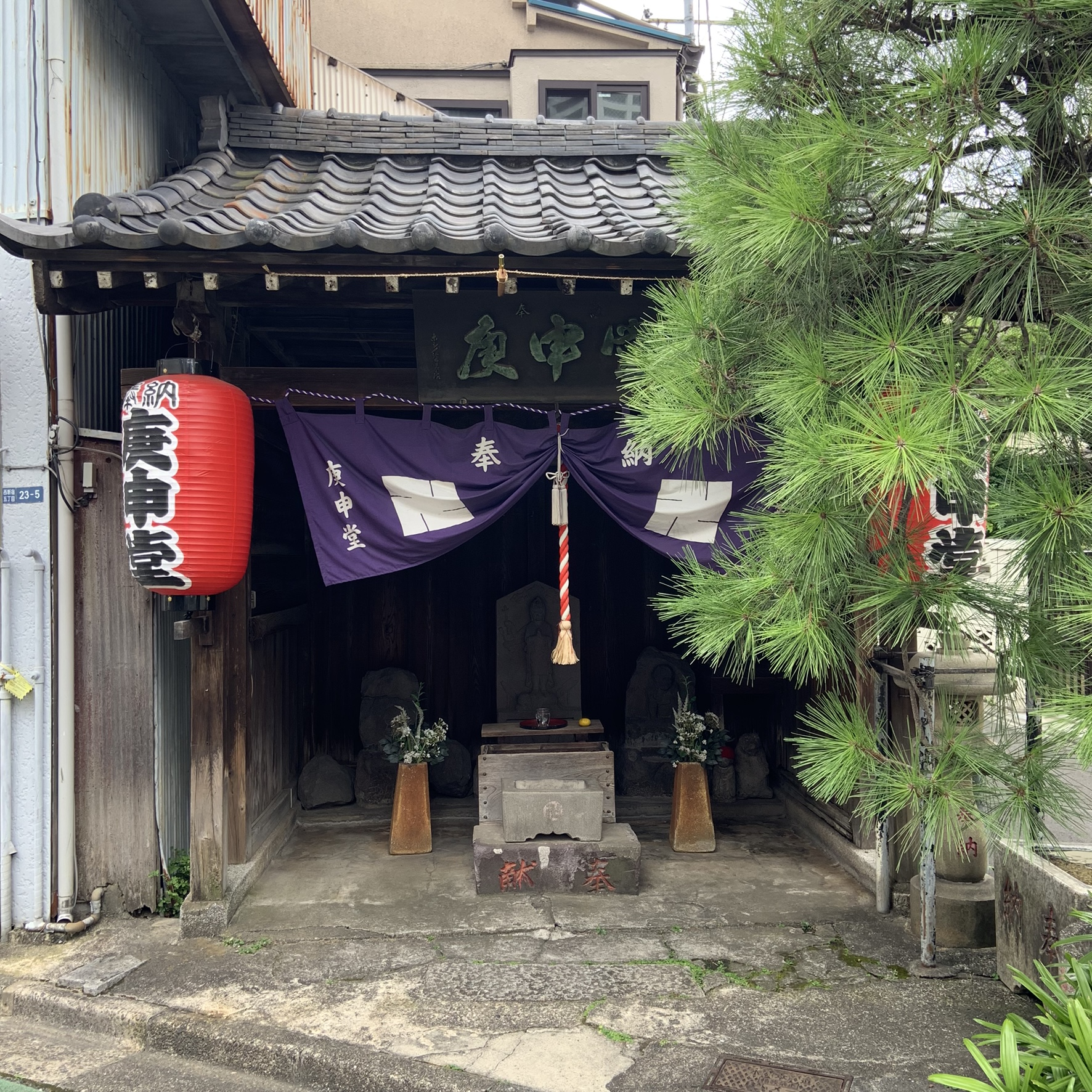 淀橋庚申堂。東京都西新宿5丁目 23−5。2019/09/12撮影。